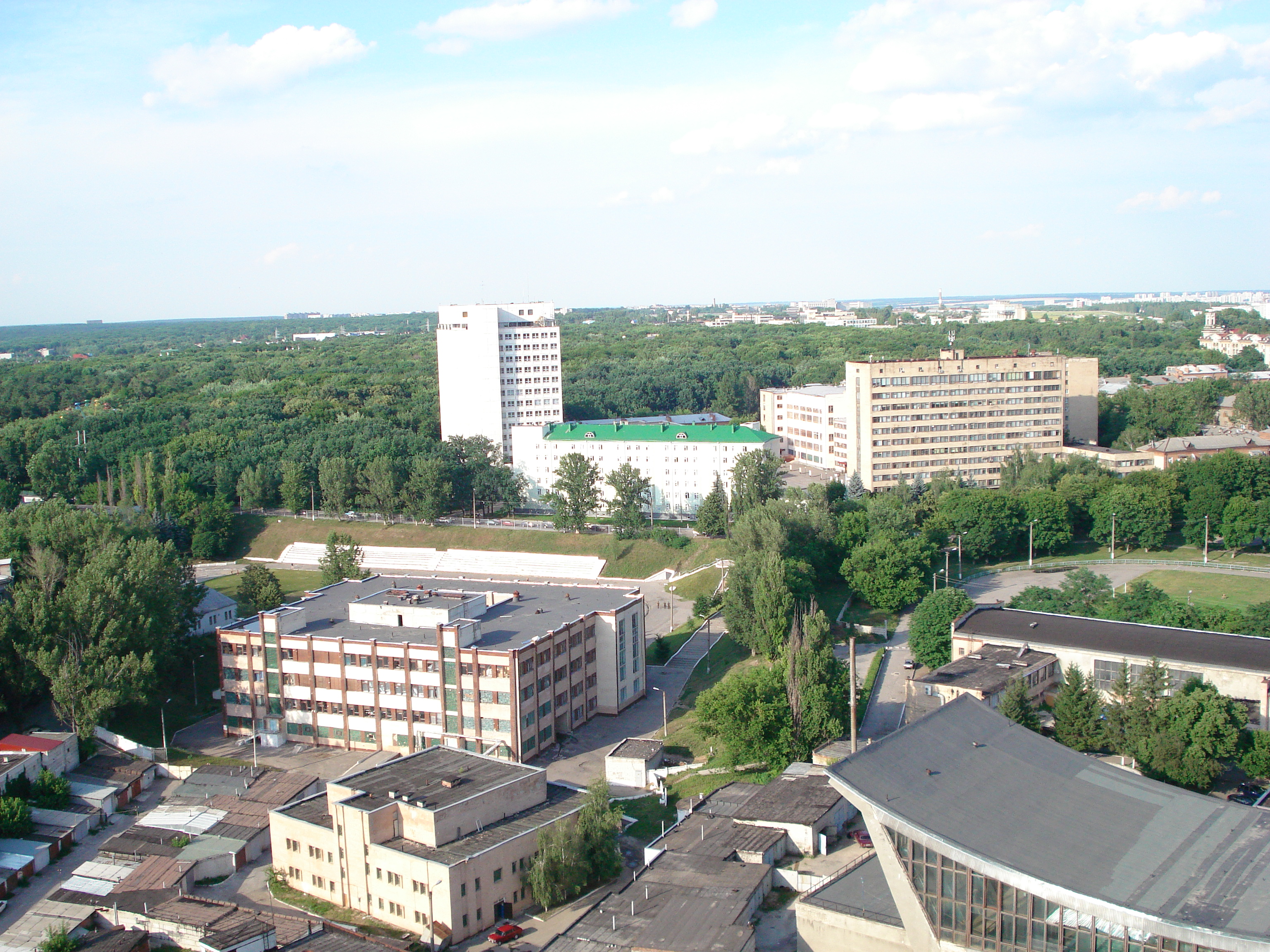 б. Харьковское ракетное училище (ХВВКИУРВ), стадион "Звезда" (перед ним в овраге) и парк Горького со стороны Шатиловки фото с отметки + 70 м